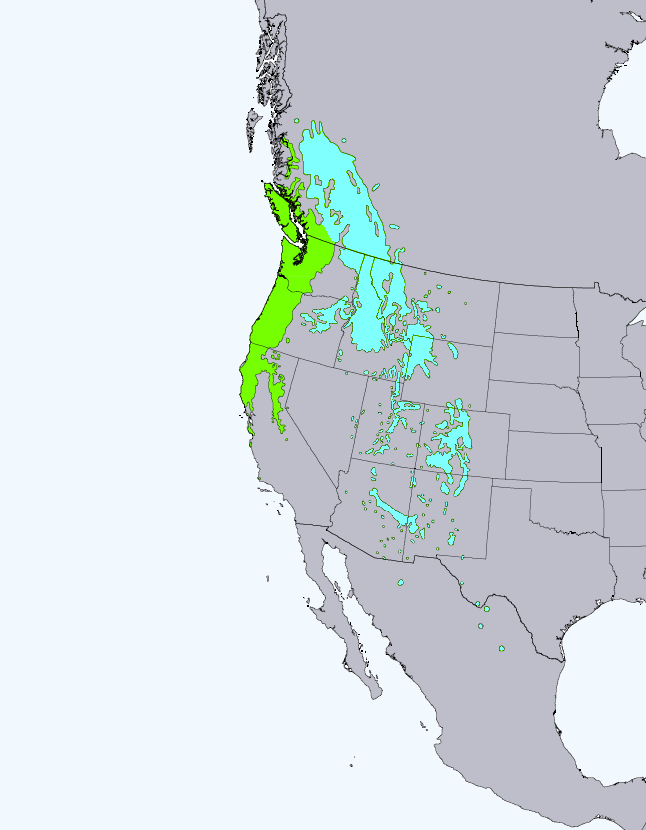 Range map of Douglas-fir Pseudotsuga menziesii. Green: Pseudotsuga menziesii subsp. menziesii Blue: Pseudotsuga menziesii subsp. glauca.